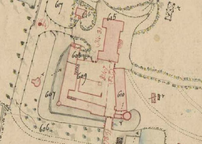 Le château de la Guérinière (Dame-Marie-les-Bois, Indre-et-Loire, France) sur le plan du cadastre napoléonien